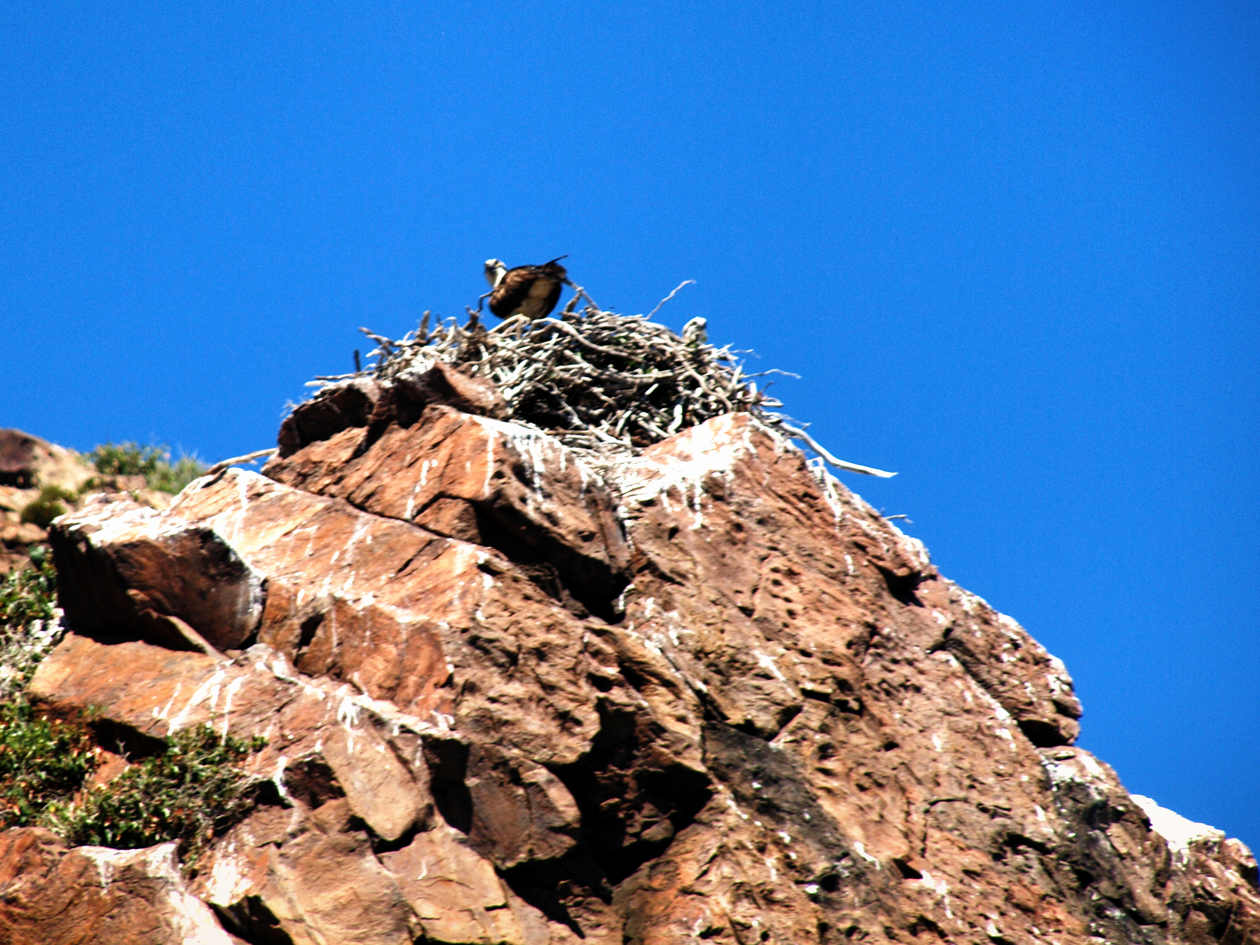 Osani (Corse) - Balbuzards pêcheurs (Pandion haliaetus) au nid (Rocher oriental d'Elbo) dans la Réserve de Scandola